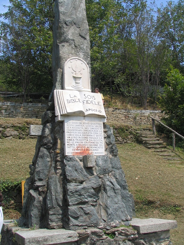 Monumento a ricordo del sinodo di Chanforan delle chiese valdesi nel 1532